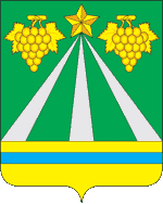 Герб Крымского района Краснодарского края